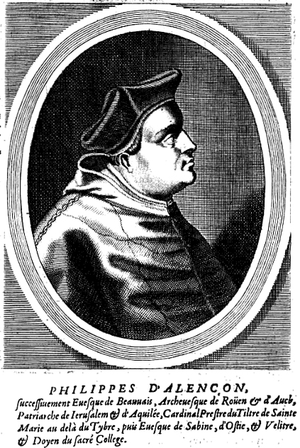 Philippe d'Alençon de Valois, dit le cardinal d'Alençon († 16 août 1397).